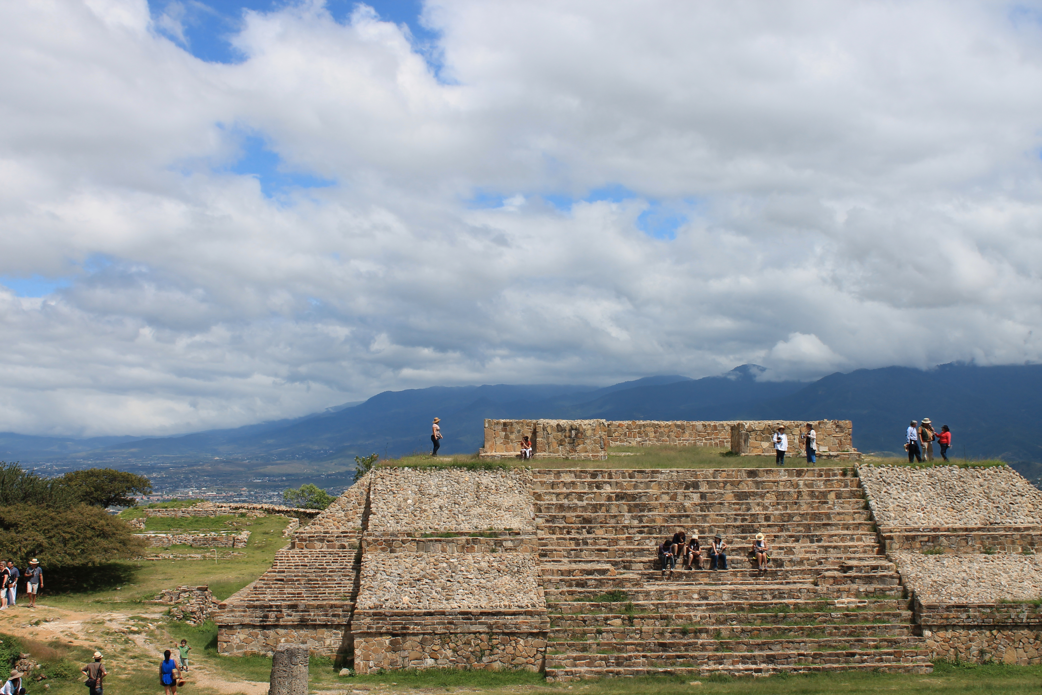 Se muestra el Edificio I de Monte Albán, dicho edificio está ubicado al norte del Patio Hundido, que a su vez está ubicado en la Plataforma Norte.